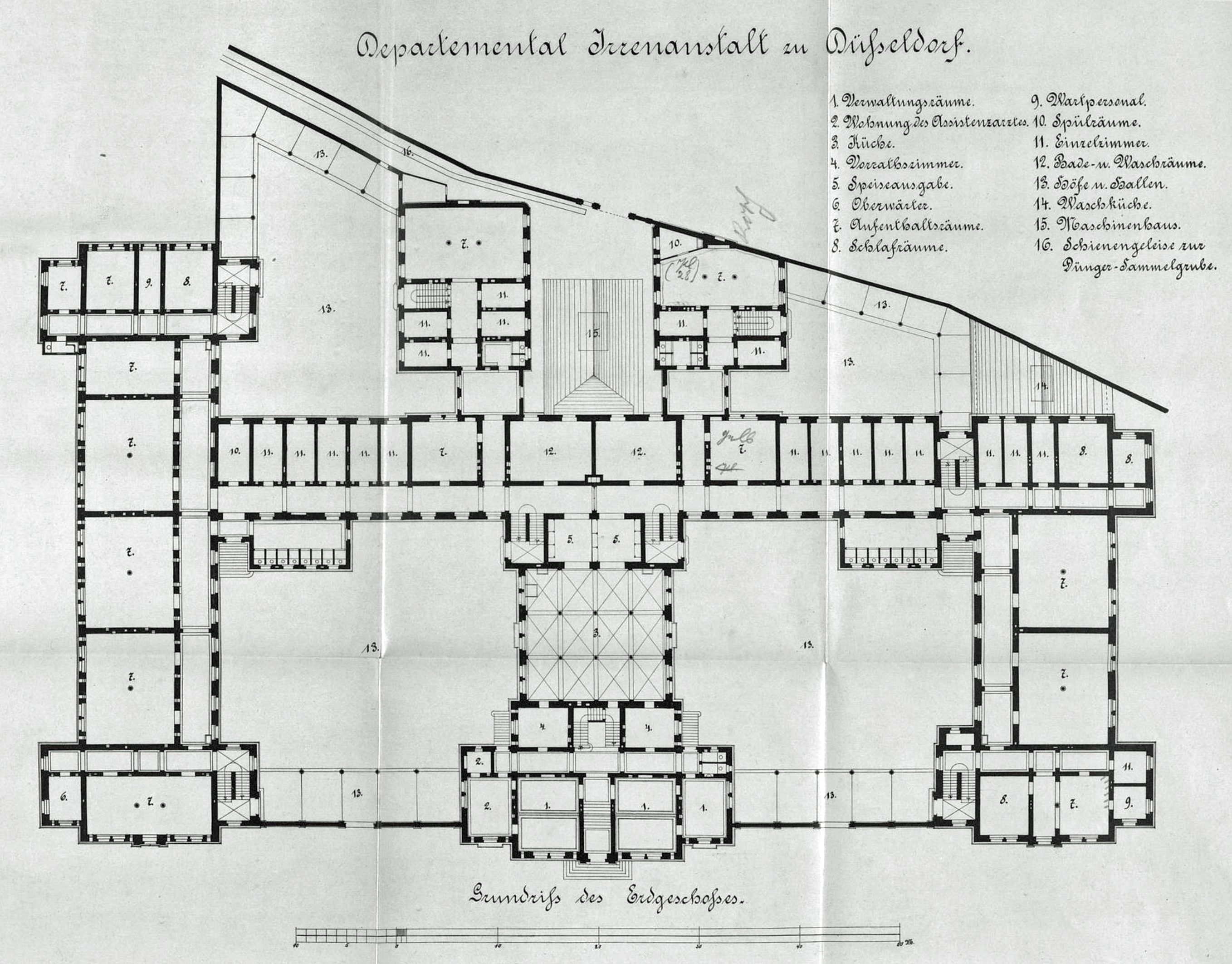 Departemental-Irrenanstalt zu Düsseldorf, Grundriss des Erdgeschoß, 1864